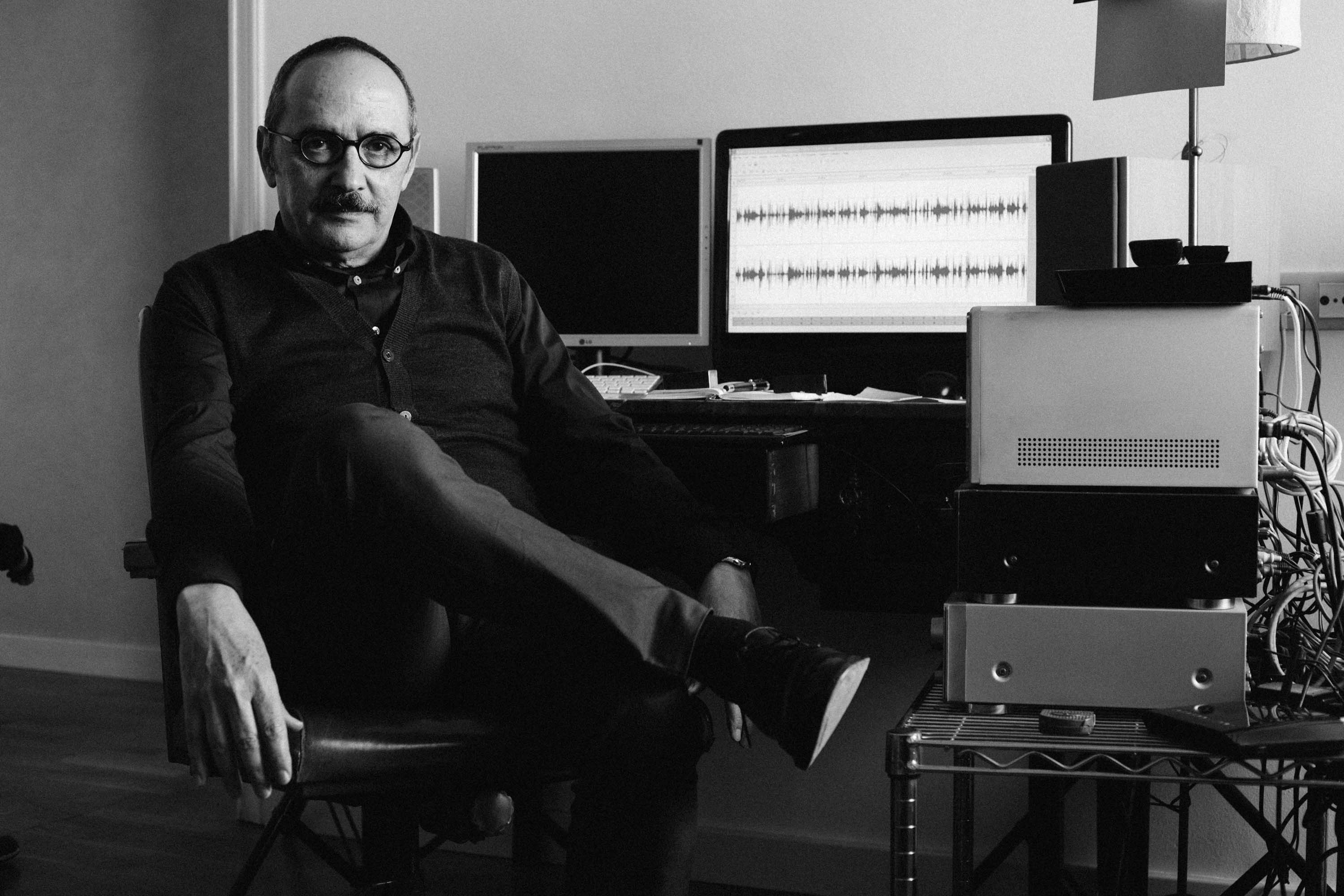 Vicens Vacca